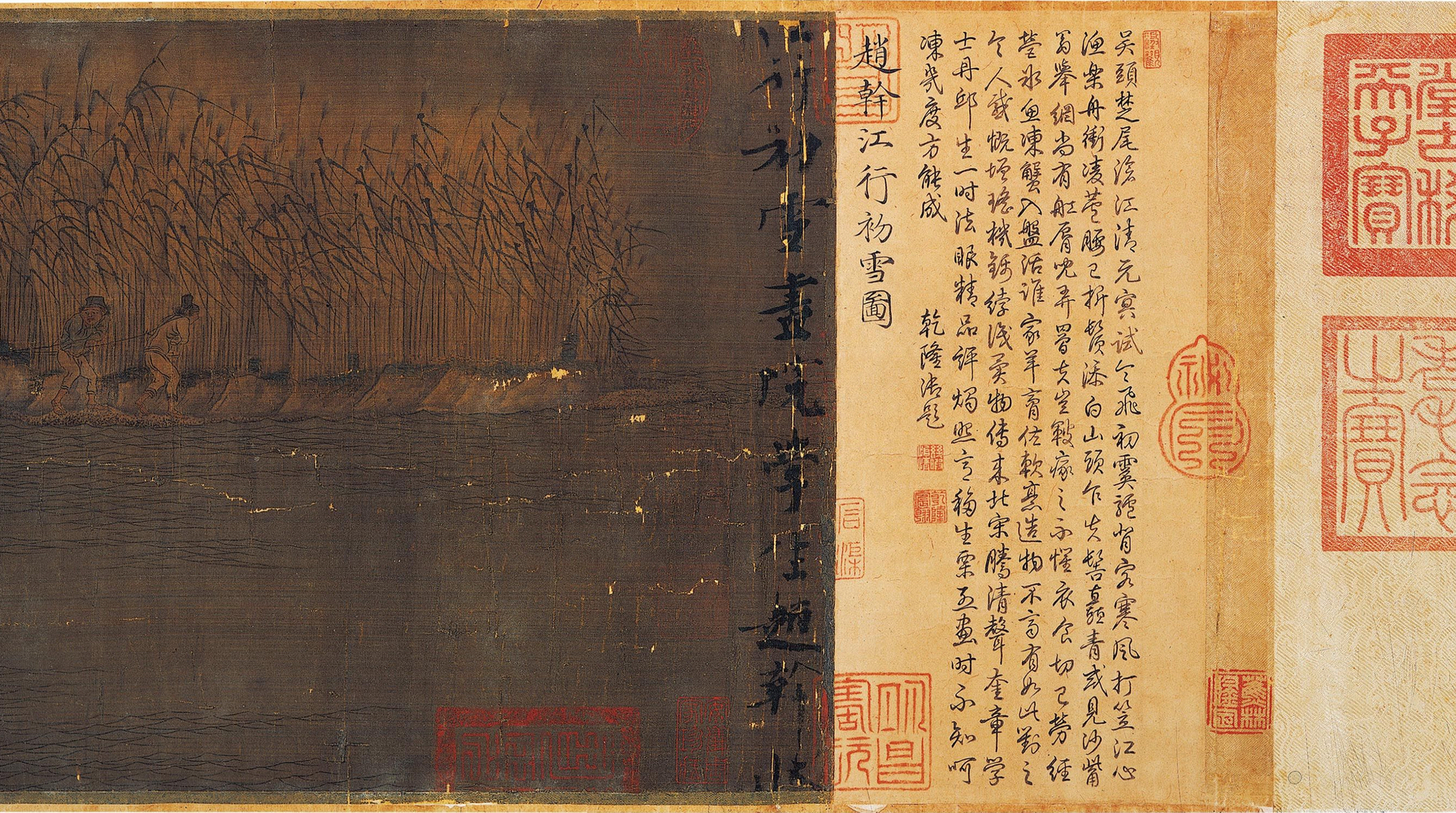 趙幹江行初雪圖首題:南唐李煜"江行初雪畫院學生趙幹狀";宋趙佶"趙幹江行初雪圖"